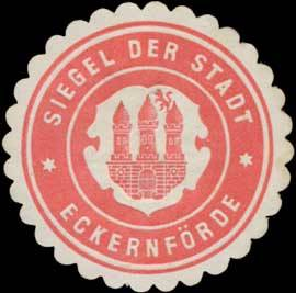 Sealing stamp Title: Siegel der Stadt Eckernförde Description: rot, weiß, geprägt Place: Eckernförde size: 4 cm